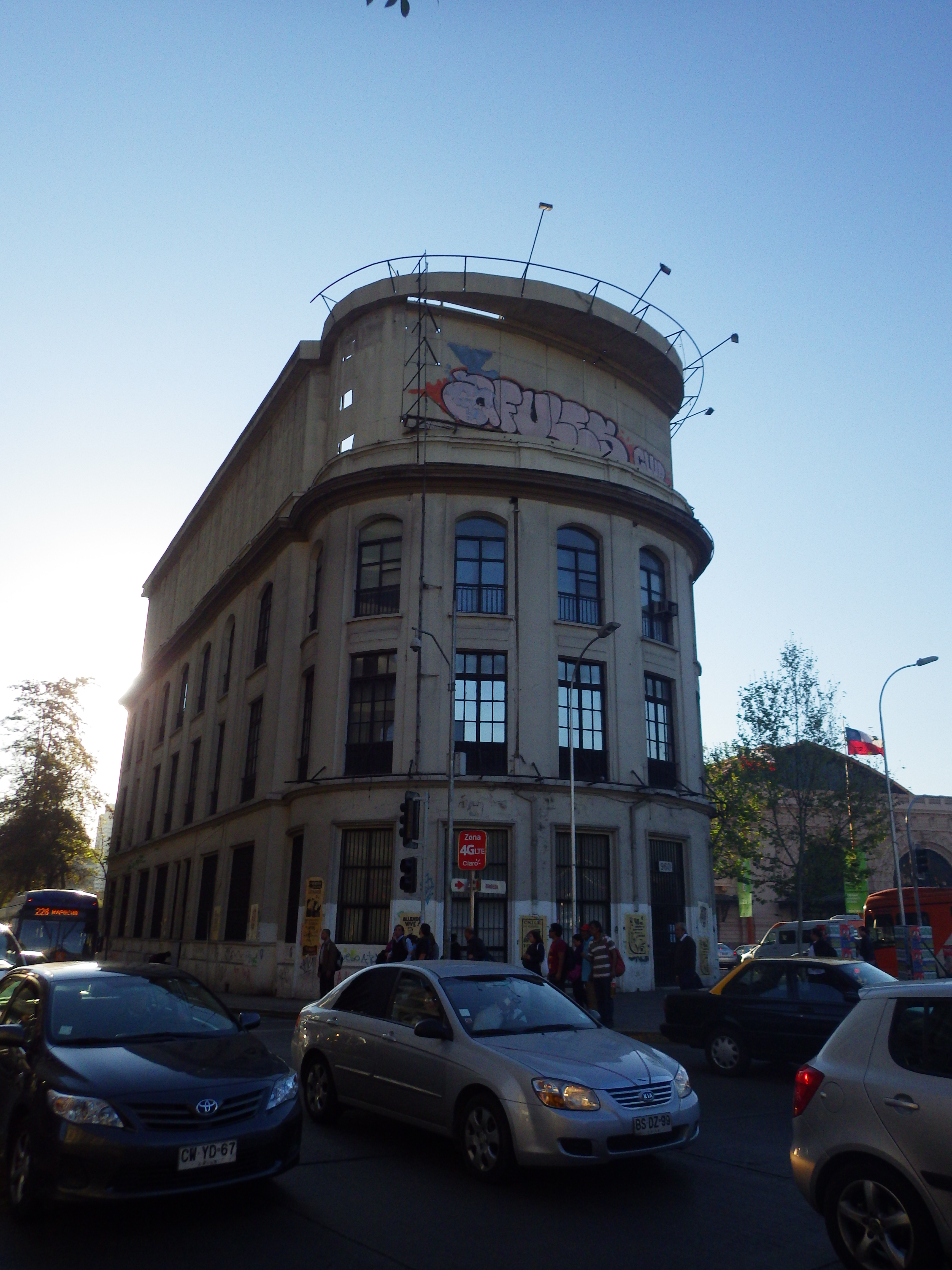 El ex Hotel Bristol, en la actualidad forma parte de las dependencias de la municipalidad de santiago, quien lo adquiere en 1991, aunque su reconocimiento como monumento histórico solo se da en 2007,94 años después de que comenzara la edificación; todo esto con el fin de protegerlo contra la expropiación y posterior demolición del mismo para la realización de la autopista costanera sur. This is a photo of a national monument in Chile: 2004